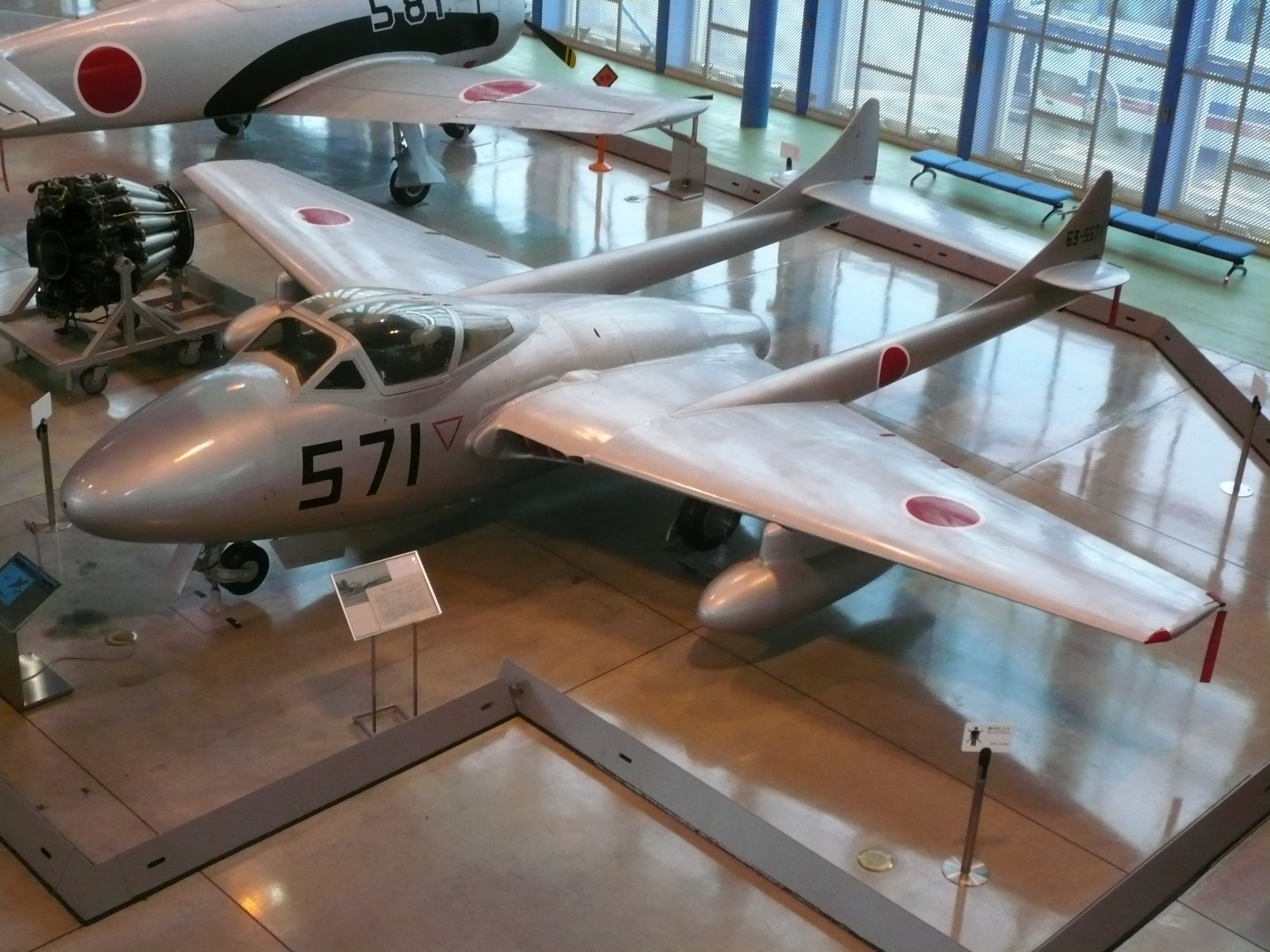 航空自衛隊浜松基地広報館のバンパイア・トレーナー